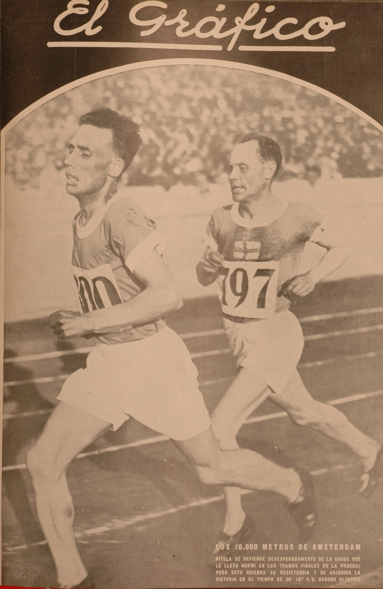 El Grafico del 08 de Septiembre de 1928. Edicion 479